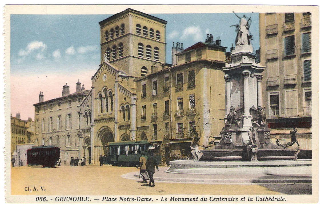 Cathédrale Notre-Dame vers 1897. Grenoble, carte 66